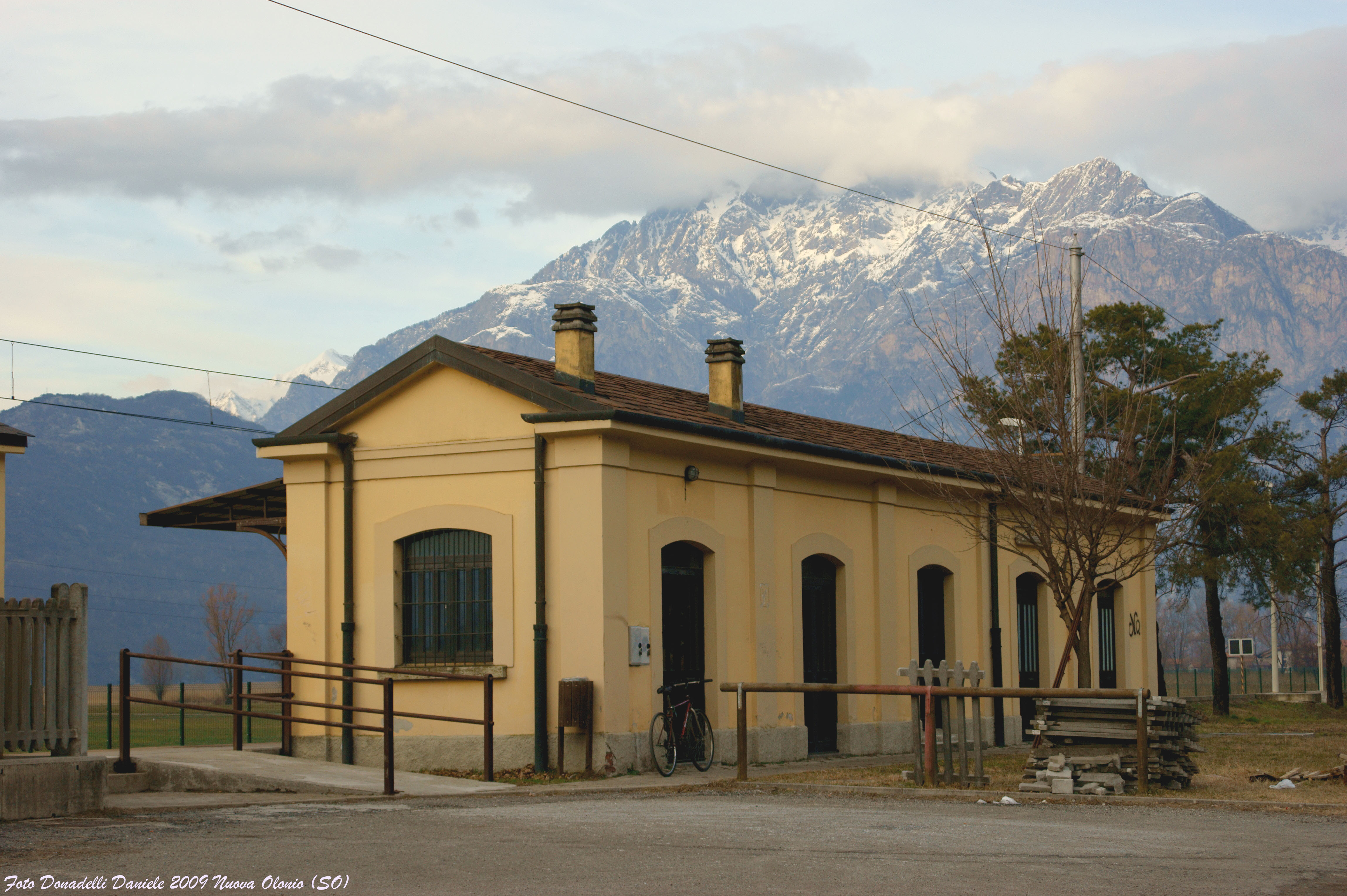 Stazione ferroviaria di Dubino